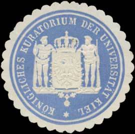 Sealing stamp Title: K. Kuratorium der Universität Kiel Description: blau, weiß, geprägt Place: Kiel size: 4 cm